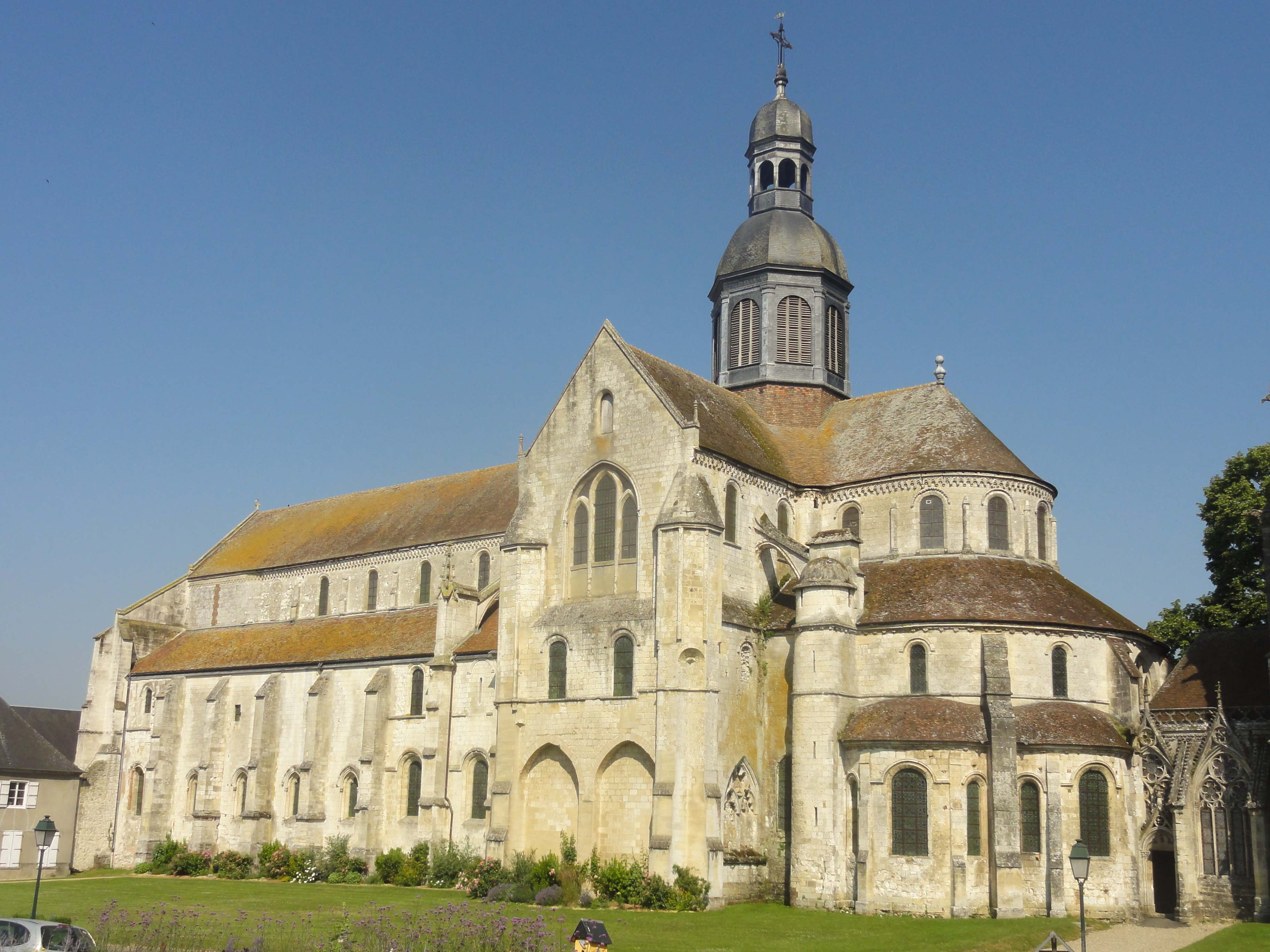 Église abbatiale Saint-Germer de l'ancienne abbaye Saint-Germer-de-Fly - voir le titre du fichier.